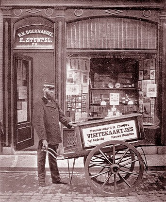 Rooms-katholieke Boekhandel H. Stumpel, Grote Noord 72, Hoorn, Nederland